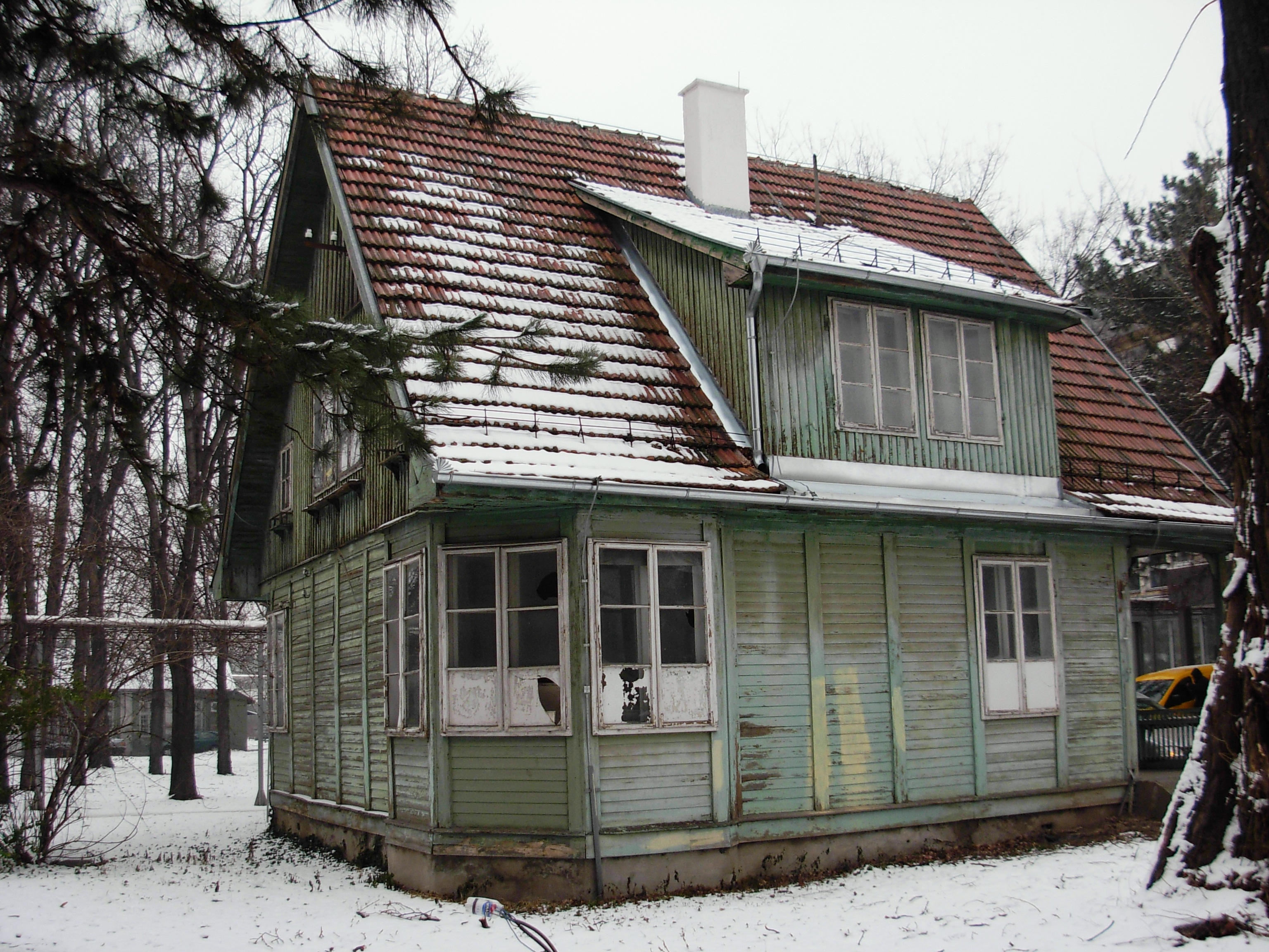 Kuća u kojoj je živeo dr Adolf Hempt. Nalazi se pored zgrade Pasterovog zavoda u Novom Sadu, u okviru kompleksa Kliničkog centra Vojvodine. To je jedini sačuvani objekat iz grupe tzv. „Dekerovih baraka“ dobijenih od Nemačke posle Prvog svetskog rata.